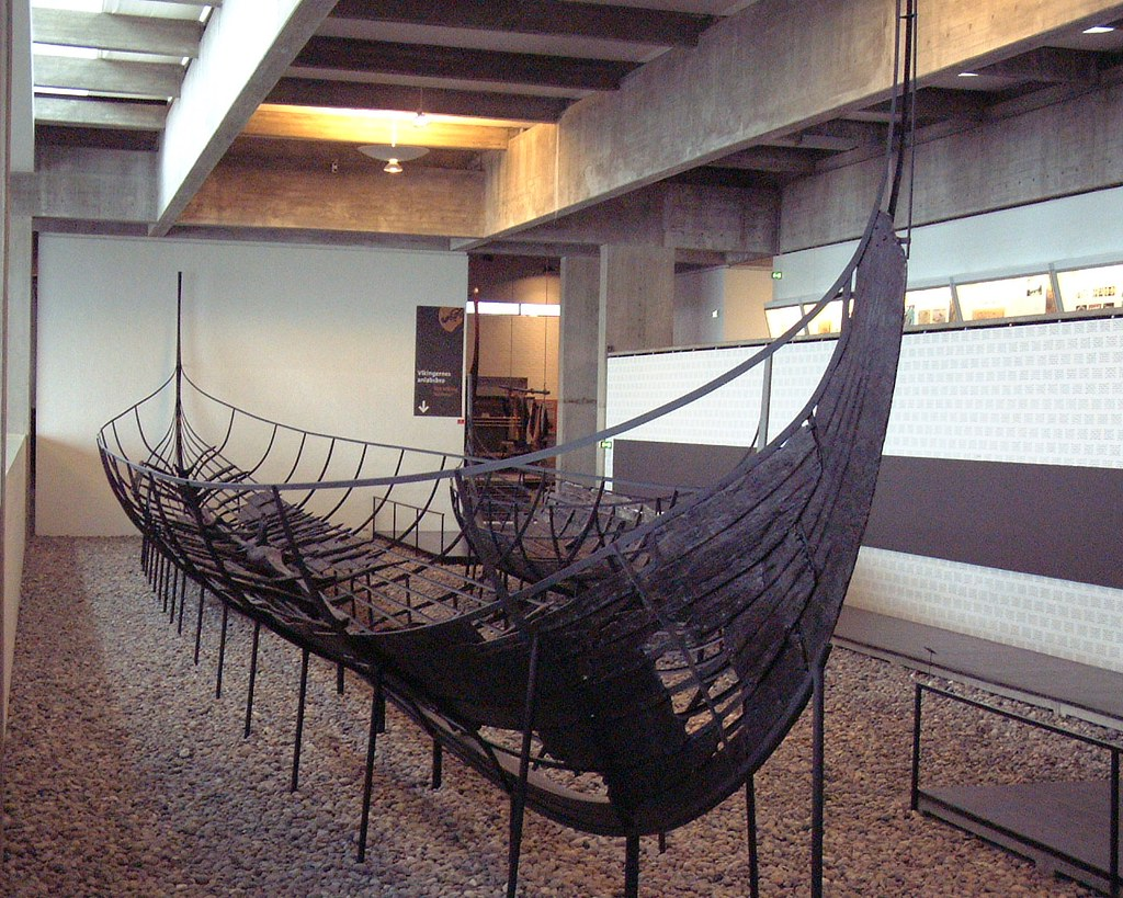 Skuldelev II: Ein wikingerzeitliches Kriegsschiff, das im Roskilde-Fjord in der Nähe von Skuldelev gefunden wurde.